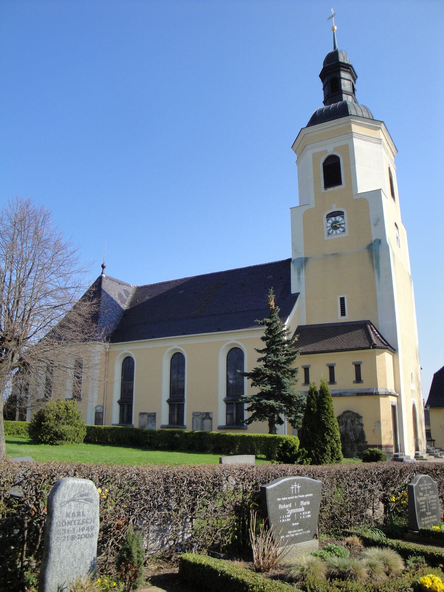 Kirche in Gröditz, Landkreis Bautzen. Hornjoserbsce: Hrodźišćanska cyrkej, wokrjes Budyšin.